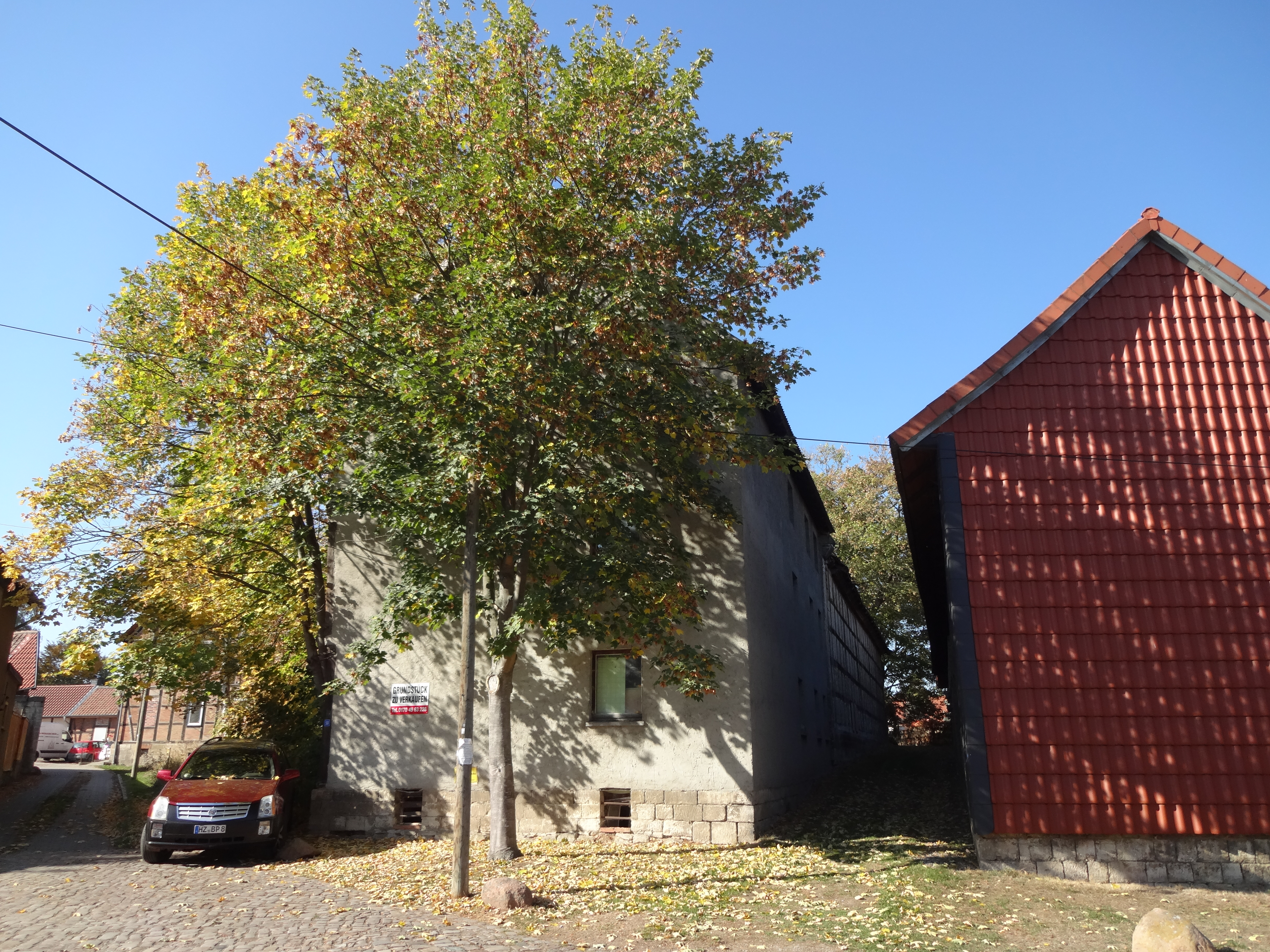 denkmalgeschützte Scheune in der Hauptstraße 50 in Zilly